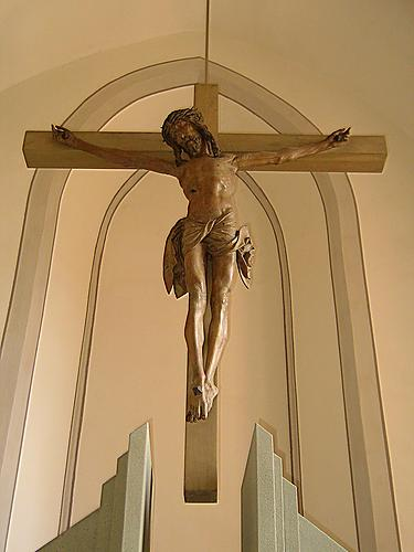 Kruzifixus von Tilman Riemenschneider im Chorraum des Kirchturms über dem Allerheiligsten, Sankt-Nikolaus-Kirche zu Steinach an der Saale